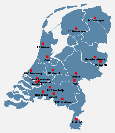 Own work